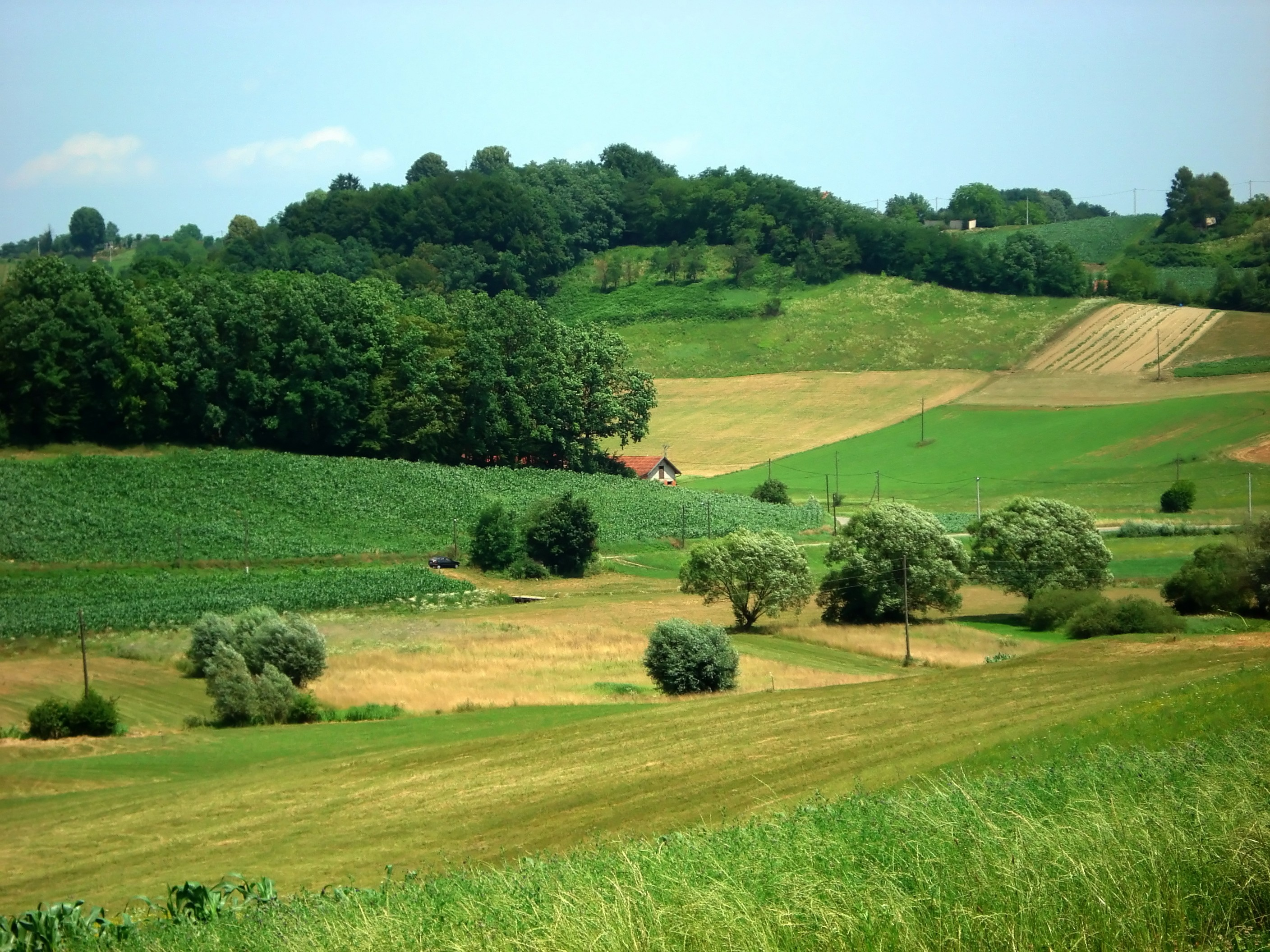 Landscape in Croatia(Hrvatsko Zagorje)